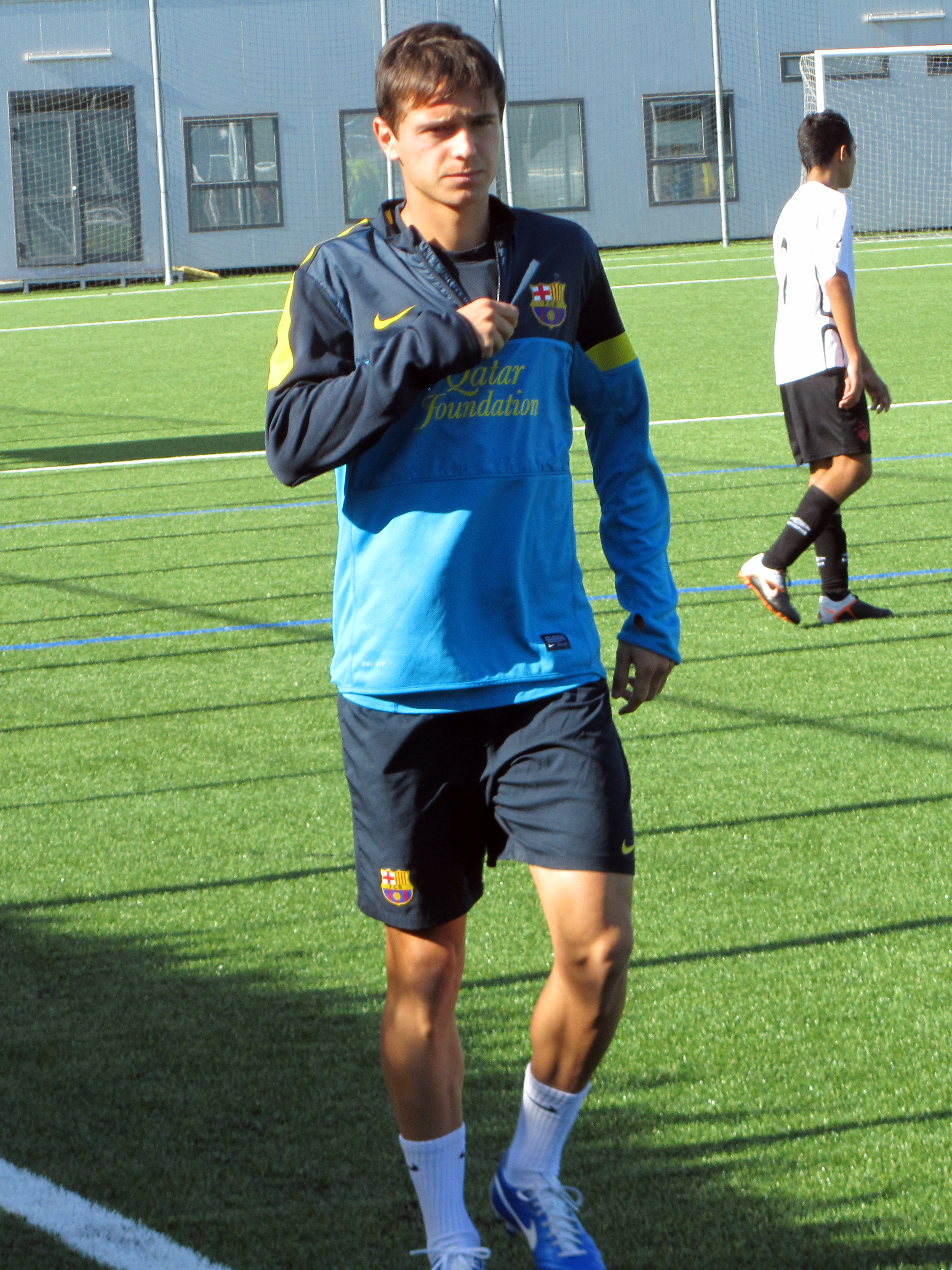 Foto realizada por Javier Segura (@castroquini en Twitter)